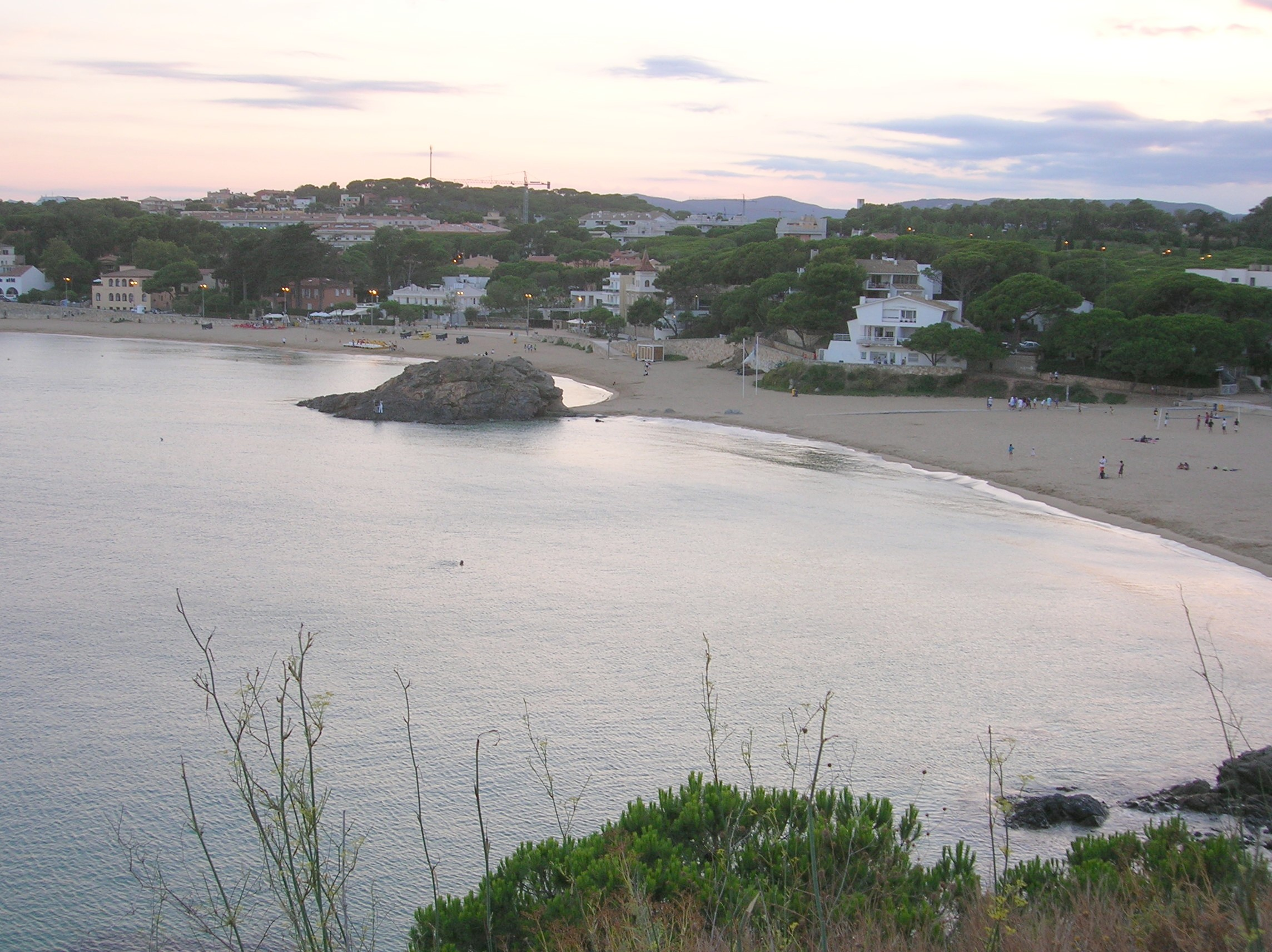 Palamós - Platja de la Fosca - Costa Brava - Catalunya